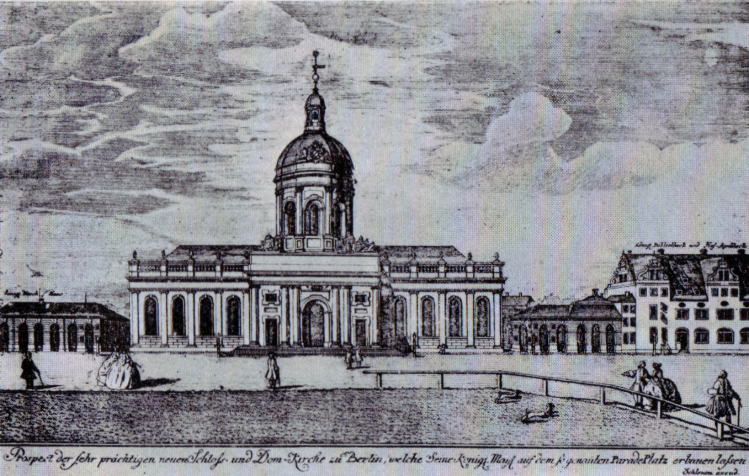 Der alte Berliner Dom um 1750